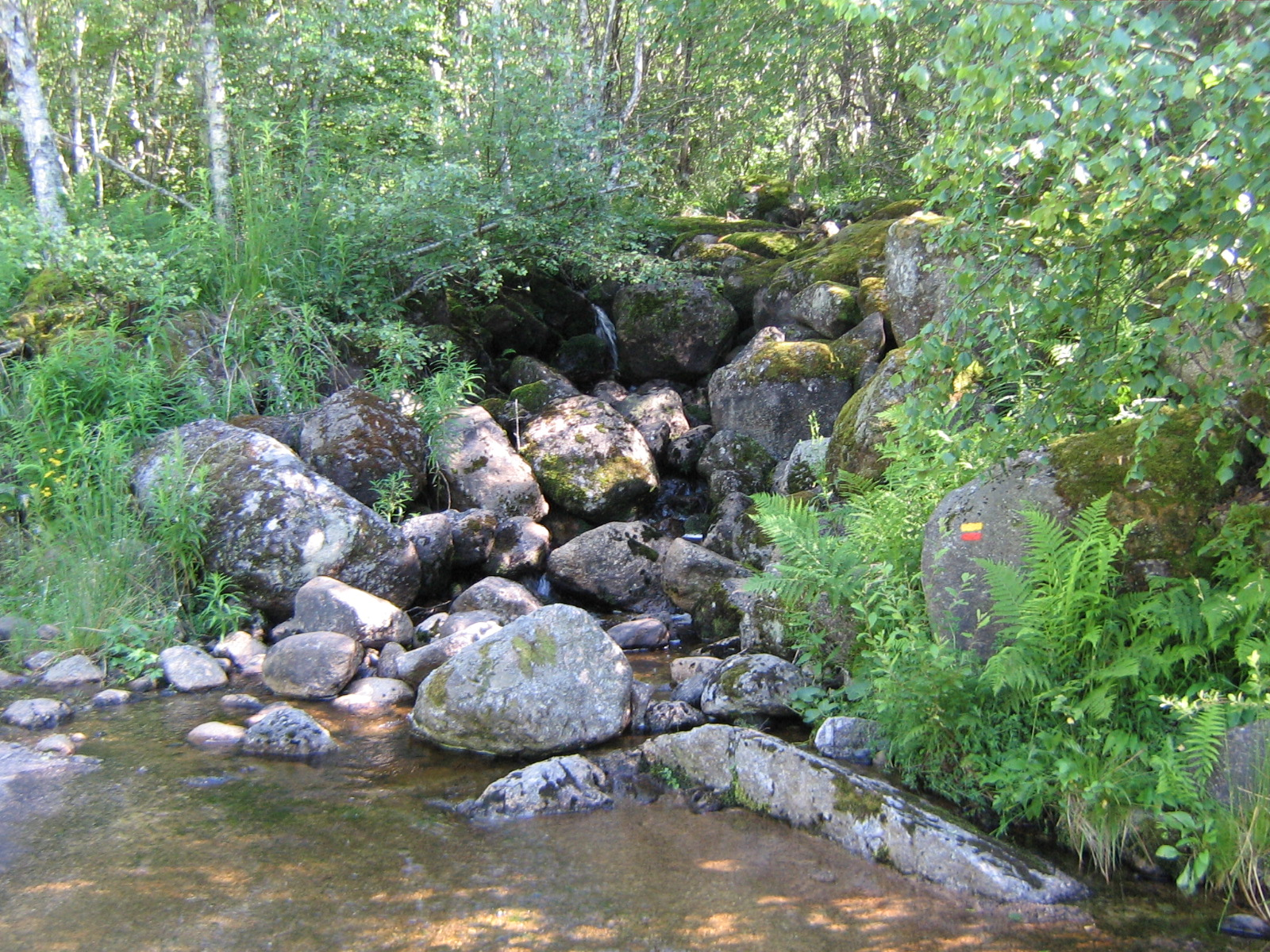 Le petit ruisseau du Truchen passe sur le GR du Tour de l'Aubrac